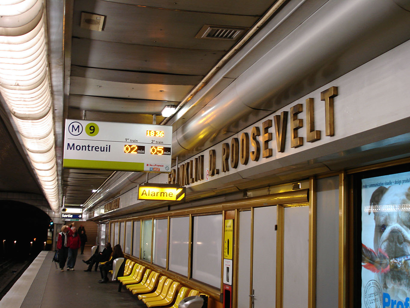 La station Franklin D. Roosevelt de la ligne 9 du métro de Paris, France.